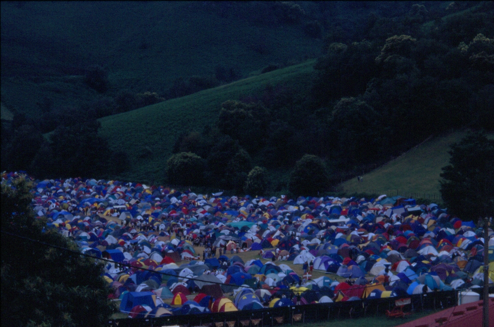 Euskal Herria Zuzenean festibala, 2002ean (Arrosa).